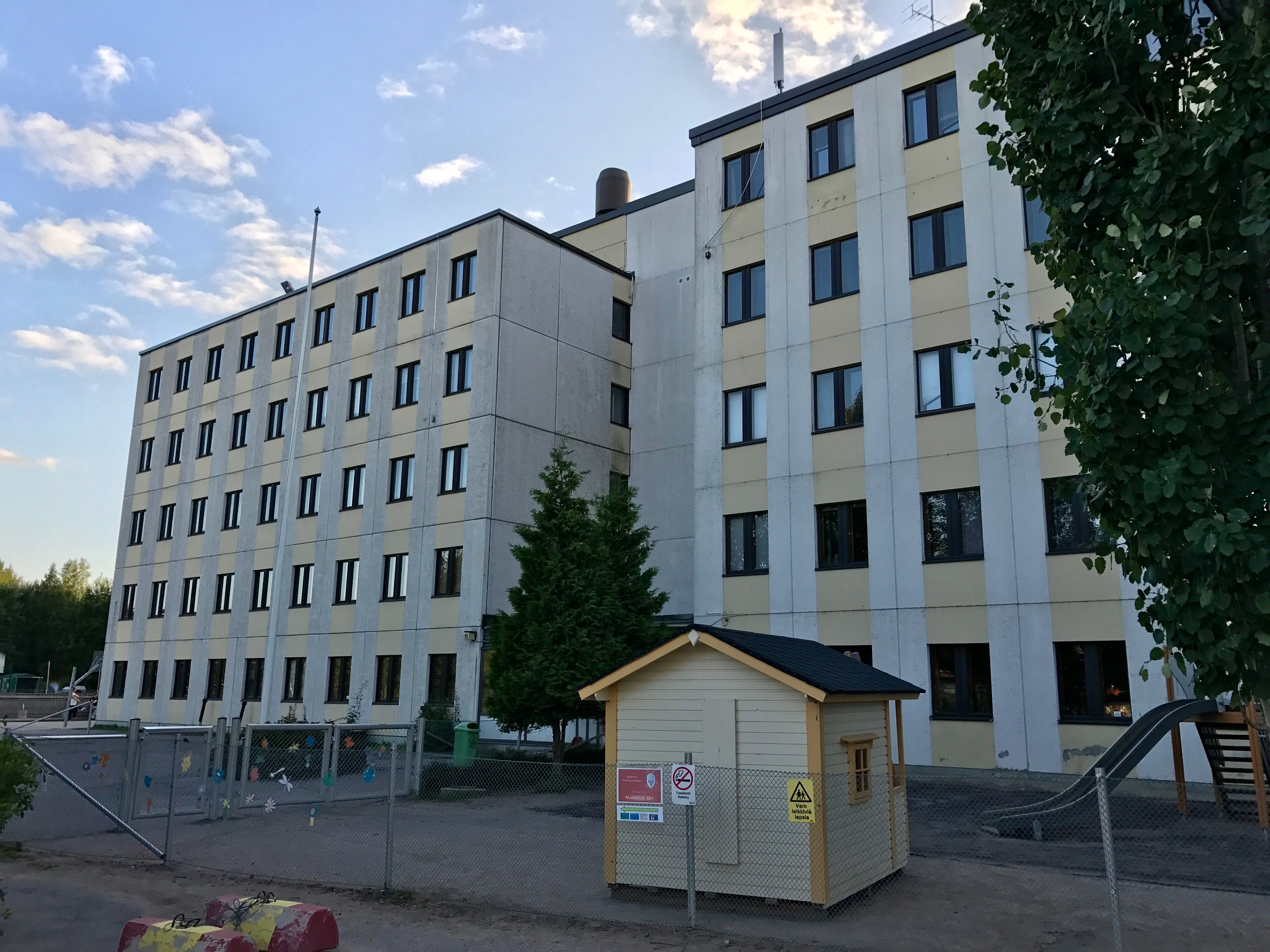 Espoon kristillinen koulu